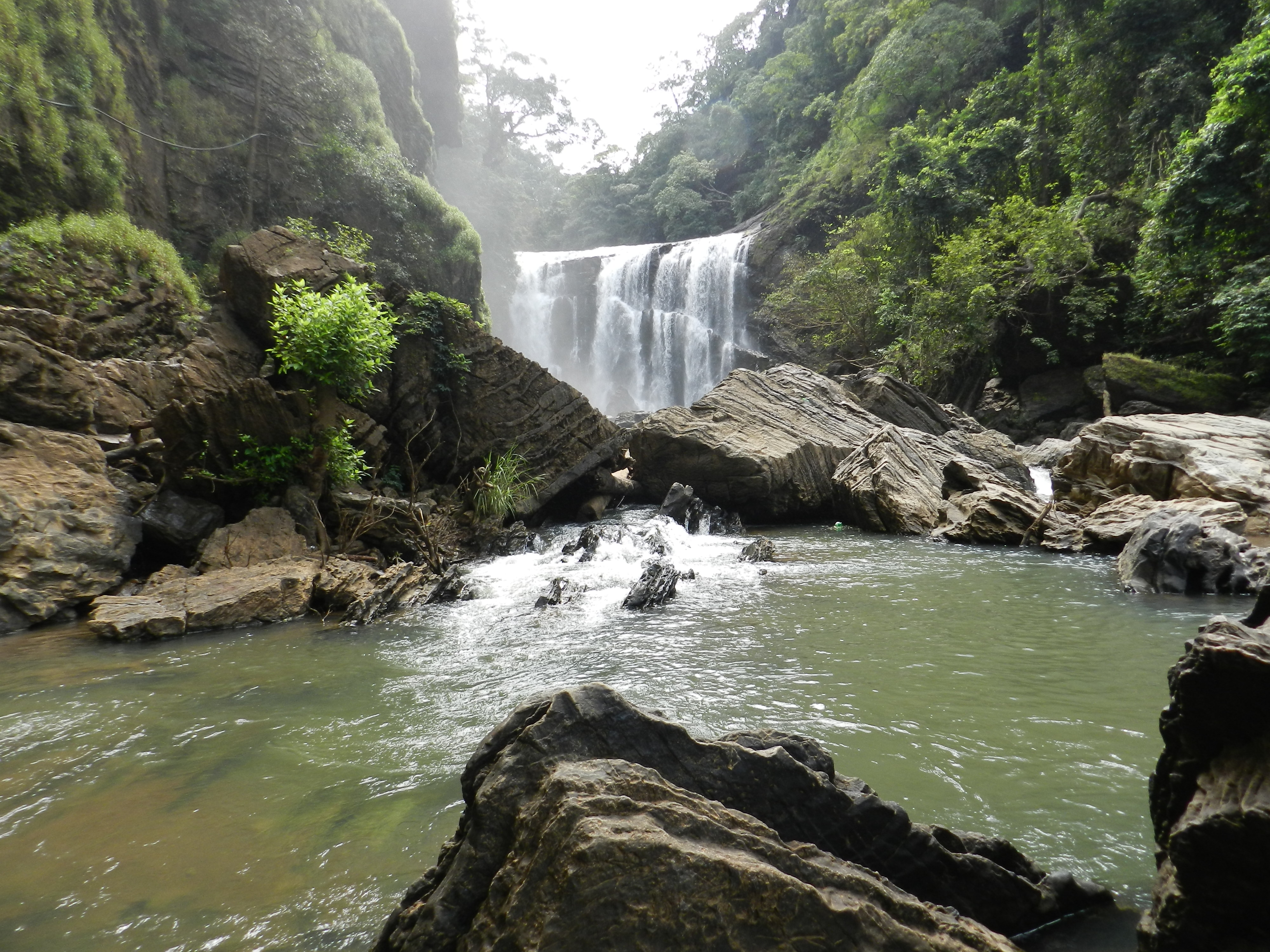 ಕನ್ನಡ: ಸಾತೋಡಿ ಜಲಪಾತ